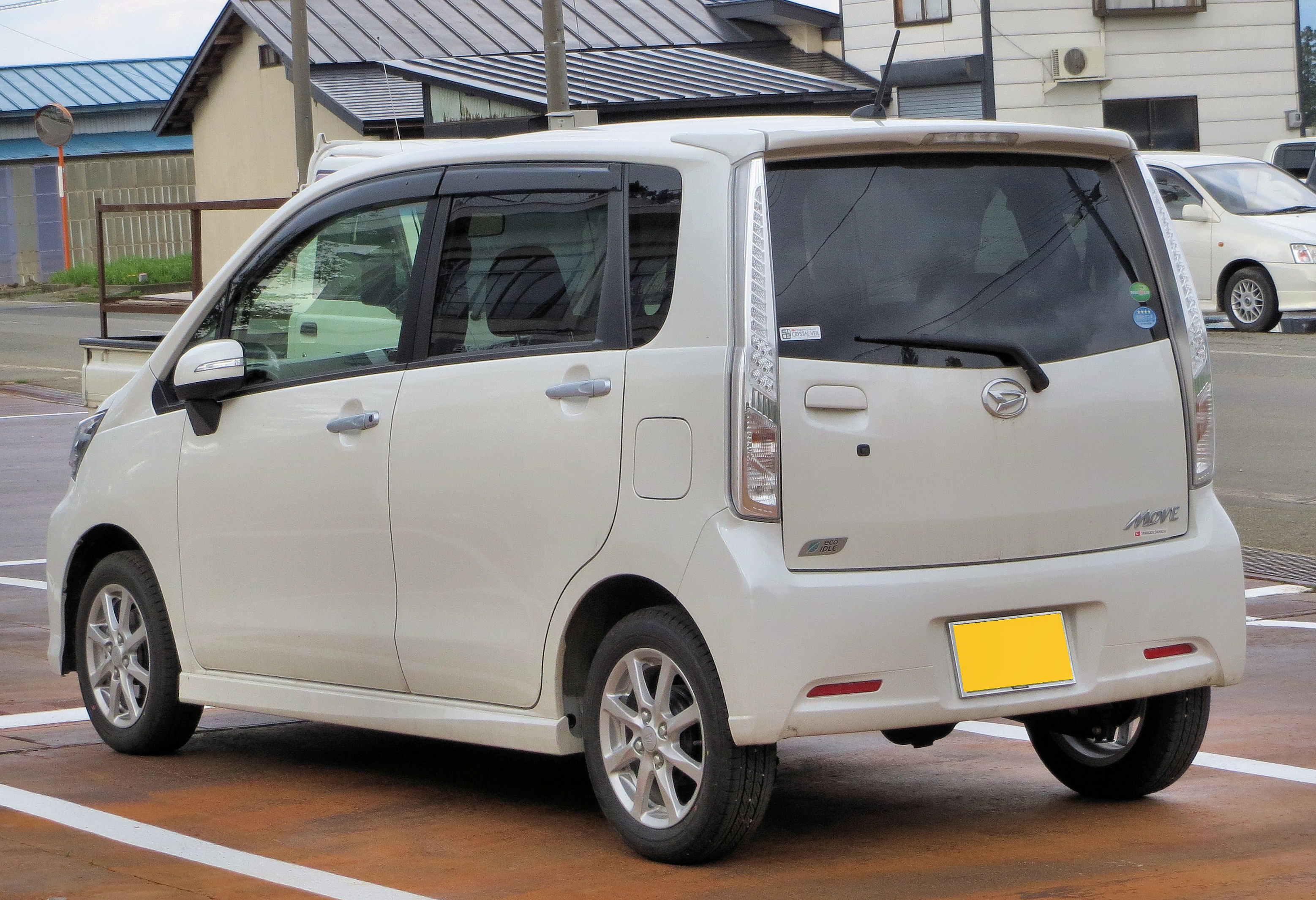 ダイハツ・ムーヴ カスタム